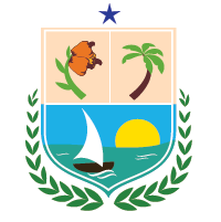 Este brasão é o símbolo do Município de Camocim.